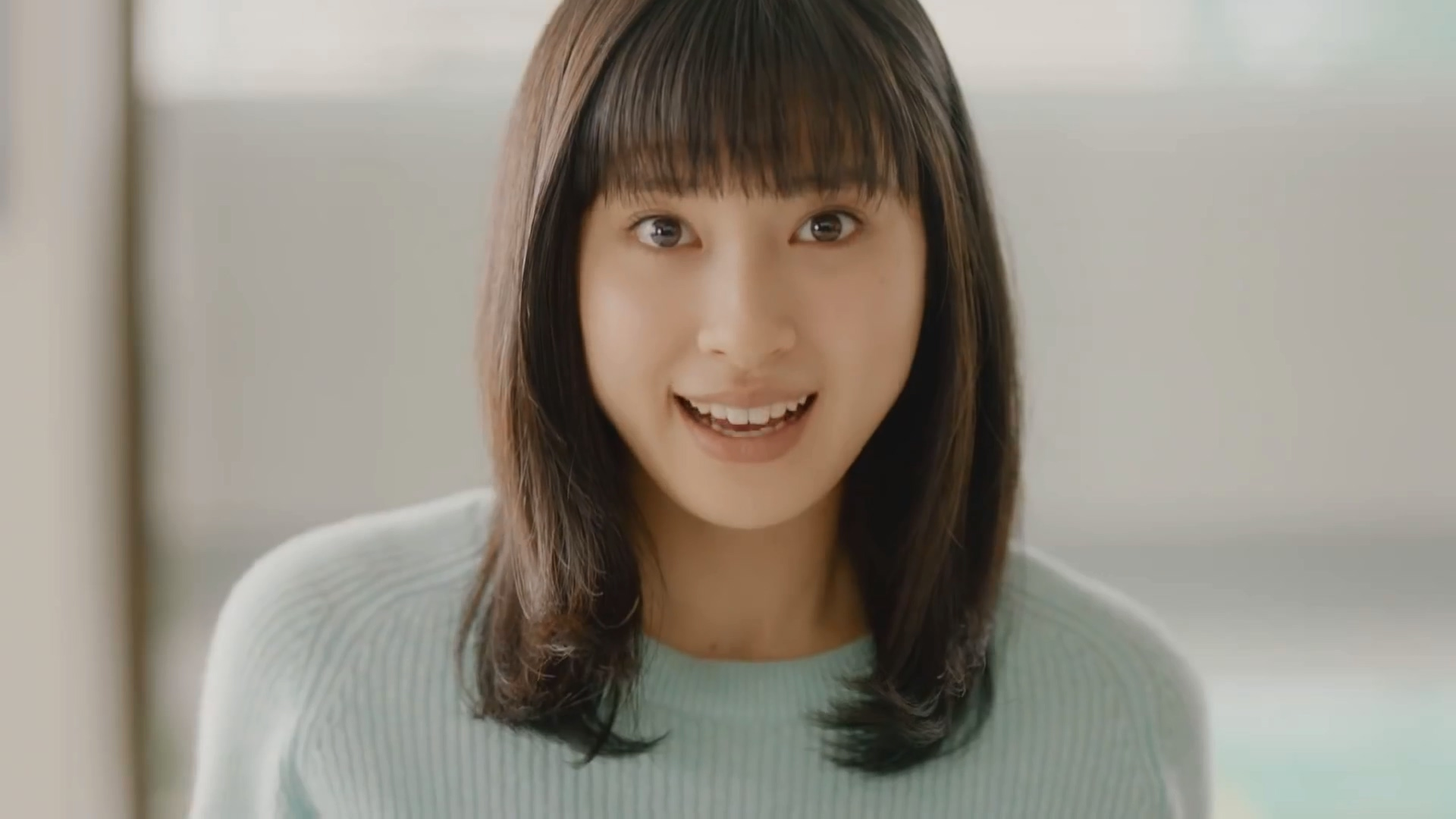 エイブル 2016年春 新CM 土屋太鳳 「あたらしい 私」 編